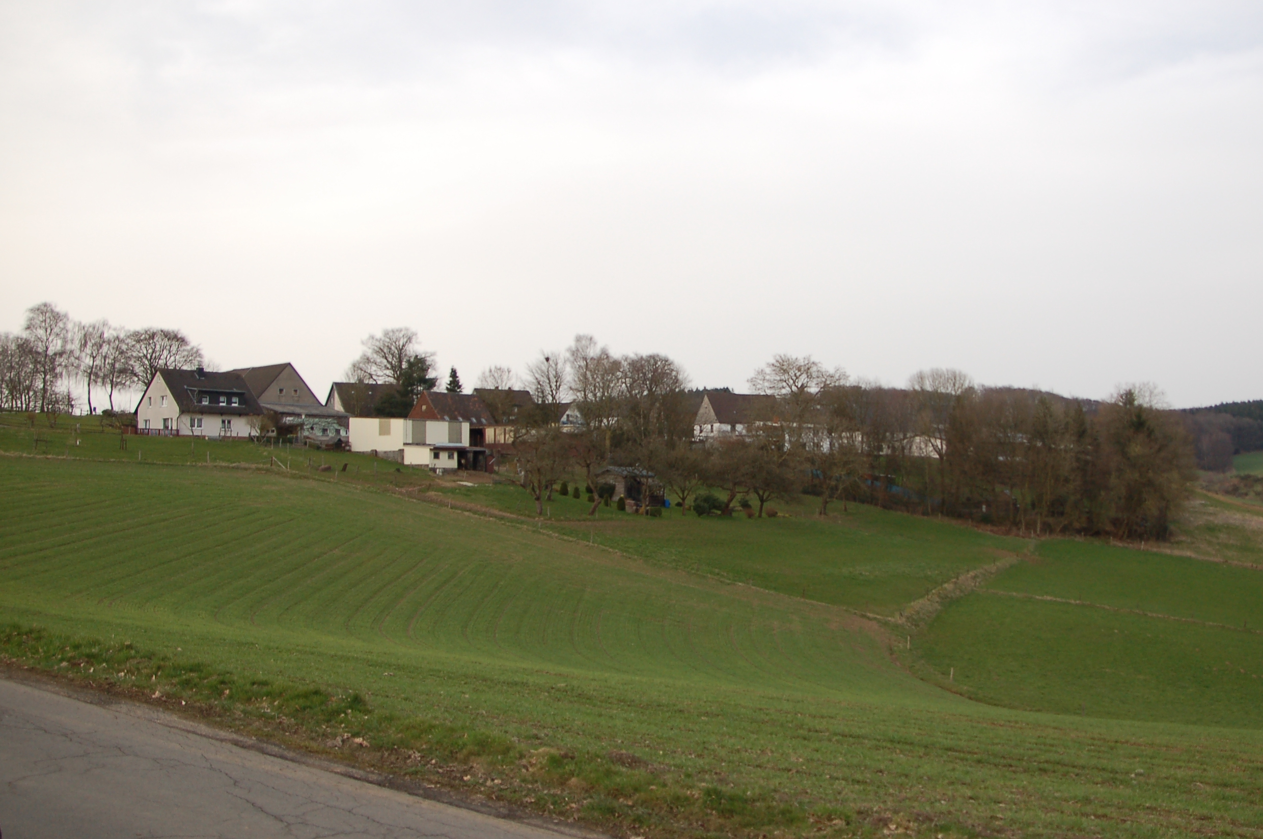 Benninghausen von Südost